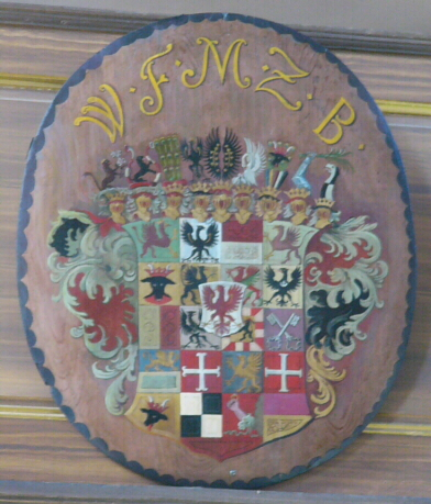 Wappen des Wilhelm Friedrich, Markgraf zu Brandenburg (WFMZB) und Fürst von Ansbach, in der Kirche St. Michael in Markt Berolzheim. 1708-1723.